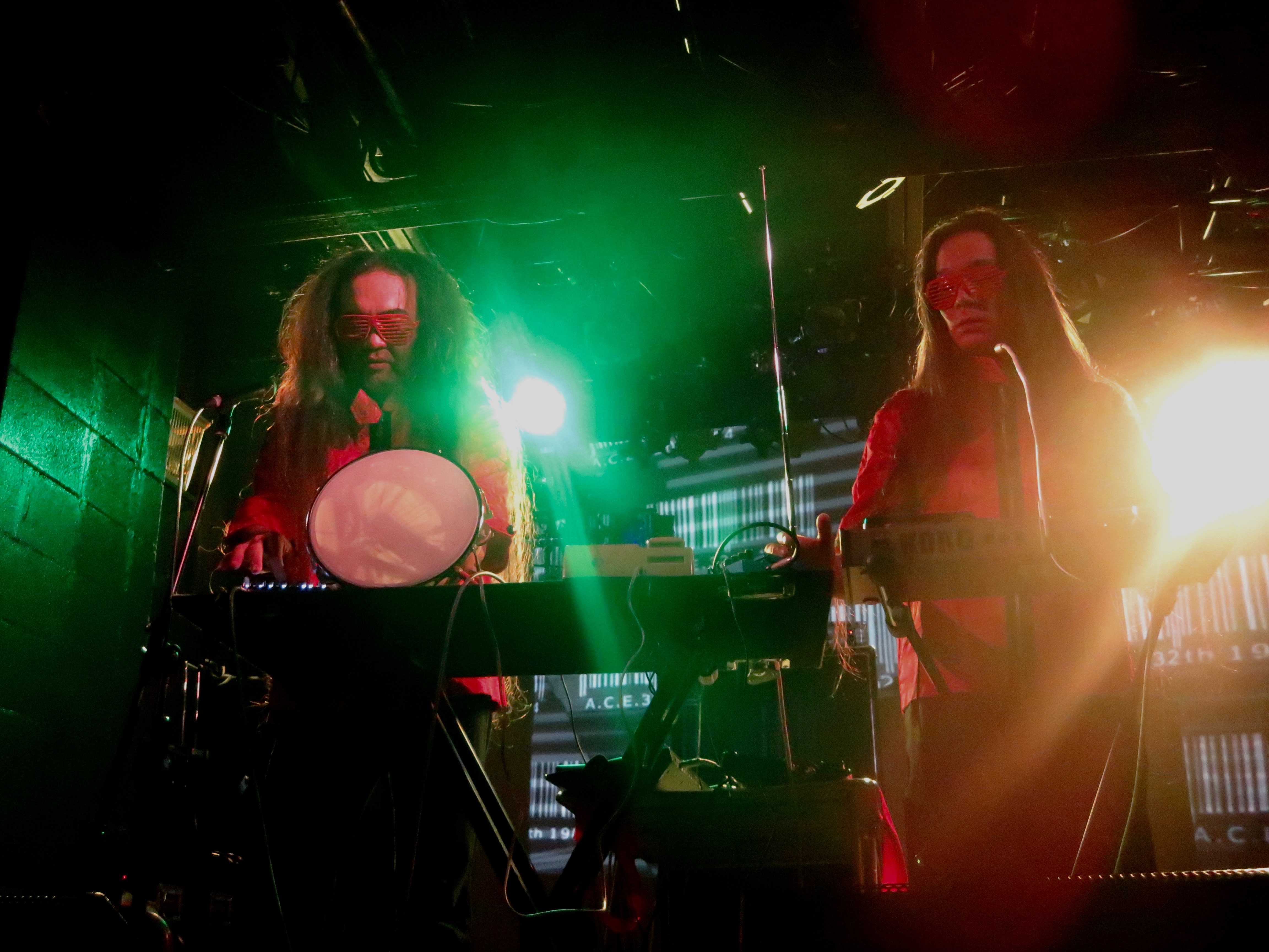 2007年11月・心斎橋ソーコアファクトリーにおけるA.C.Eのライヴ光景（向かって左が田島、右が安井）